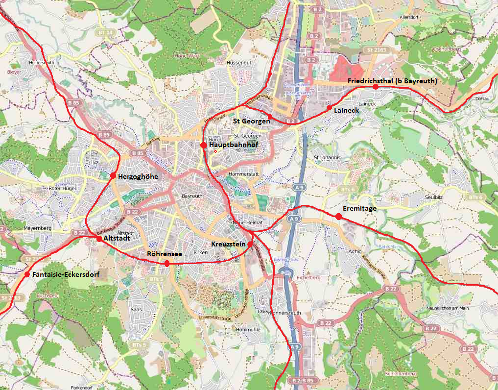 Eisenbahnnetz in der Stadt Bayreuth This map may be incomplete, and may contain errors. Don't rely solely on it for navigation.